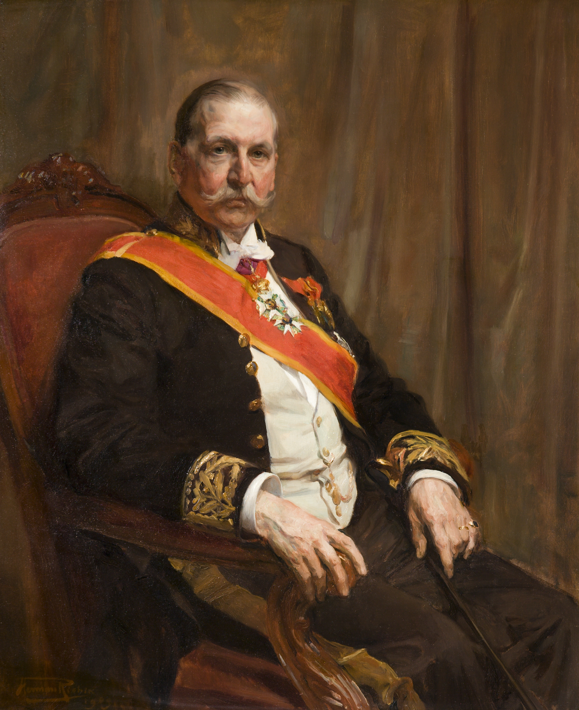 Portret van burggraaf Alfred Simonis, voorzitter van de Senaat ( 1908 - 1911)